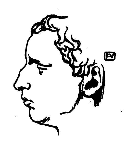 Portrait of French writer Paul Claudel (1868-1955) from Le Livre des masques (vol. II, 1898) by Remy de Gourmont (1858-1916)